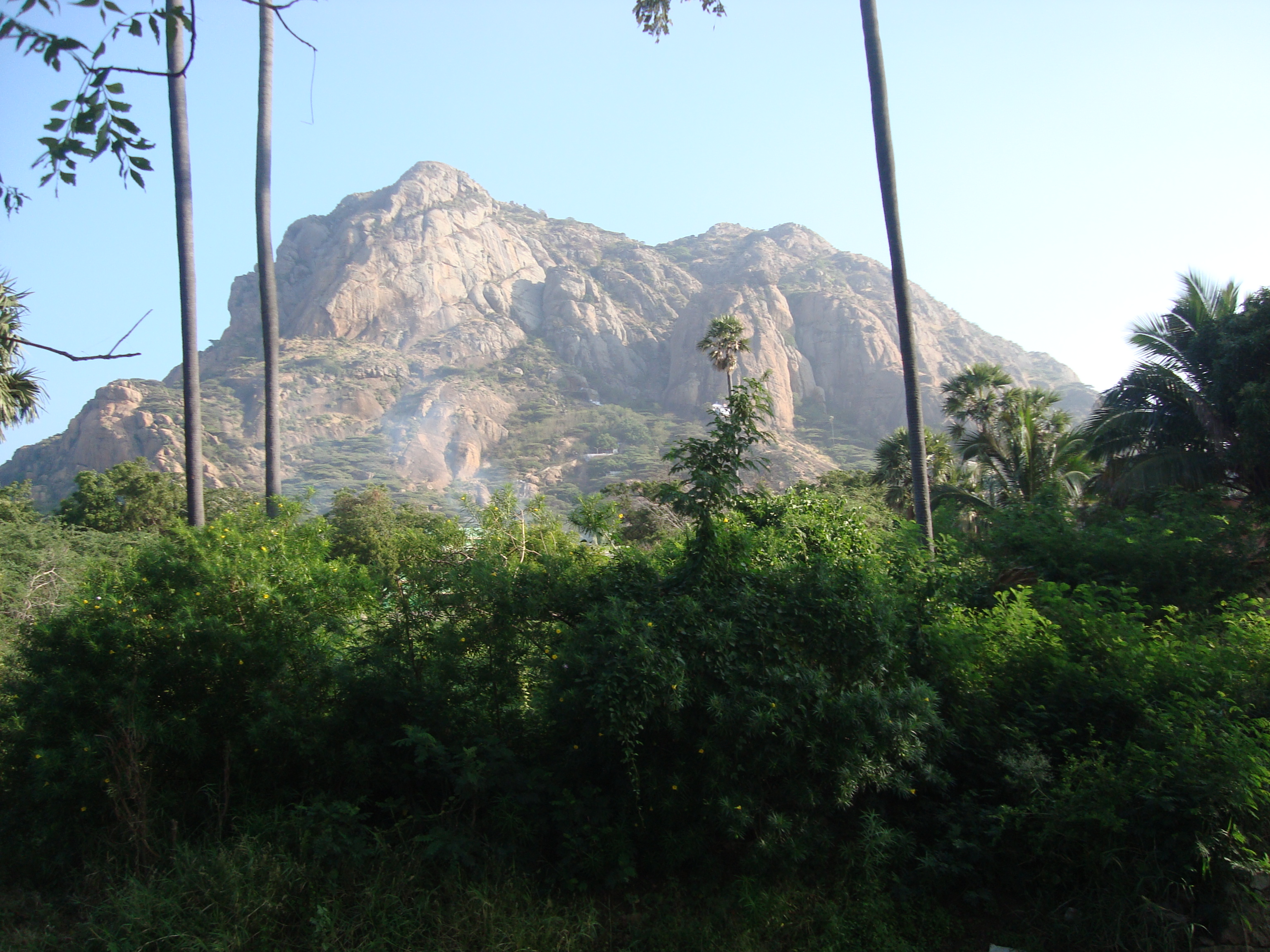 மருத்துவாமலை படம்